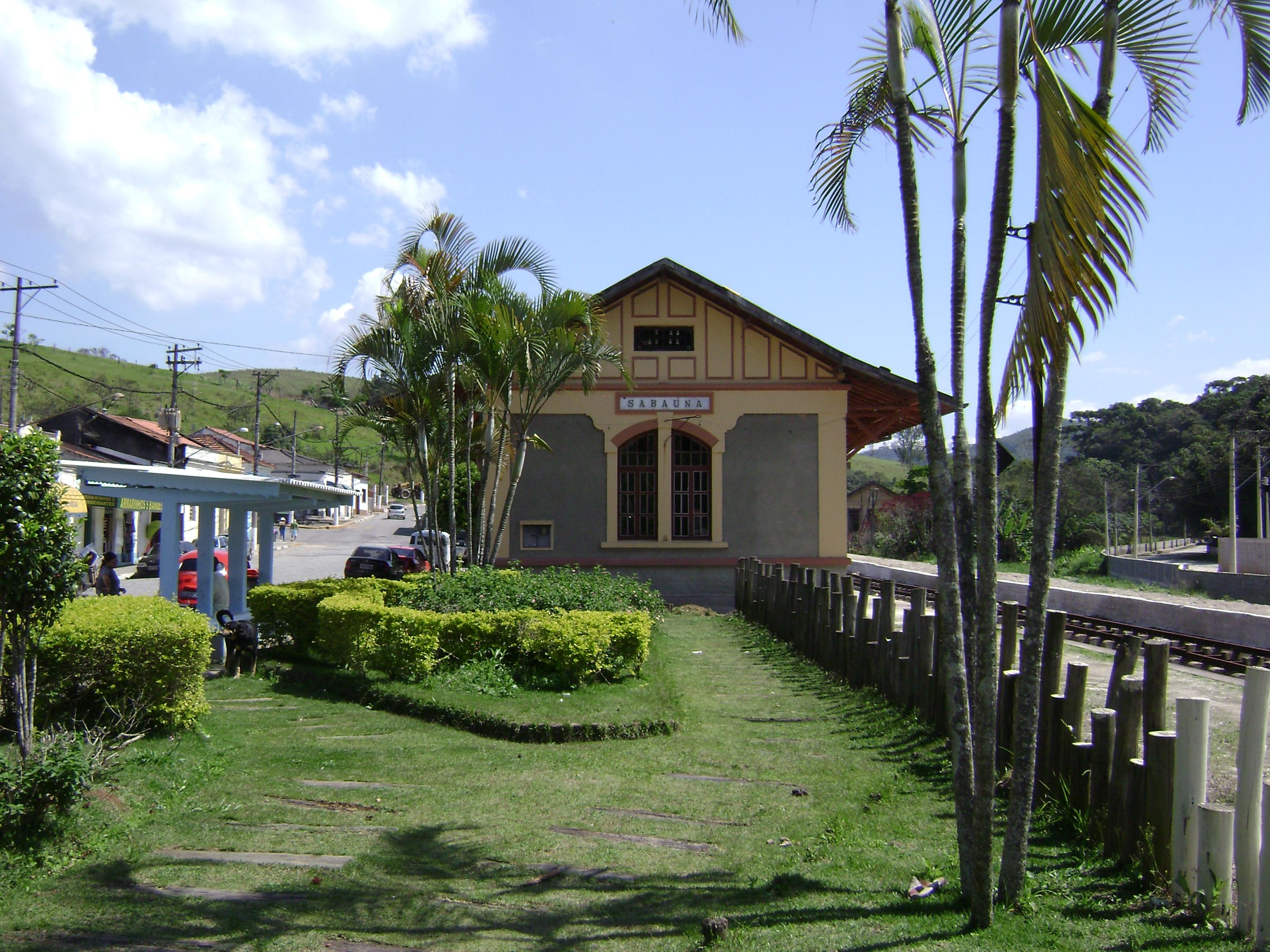 Estação Ferroviária de Sabaúna, localizada em Sabaúna, distrito de Mogi das Cruzes.